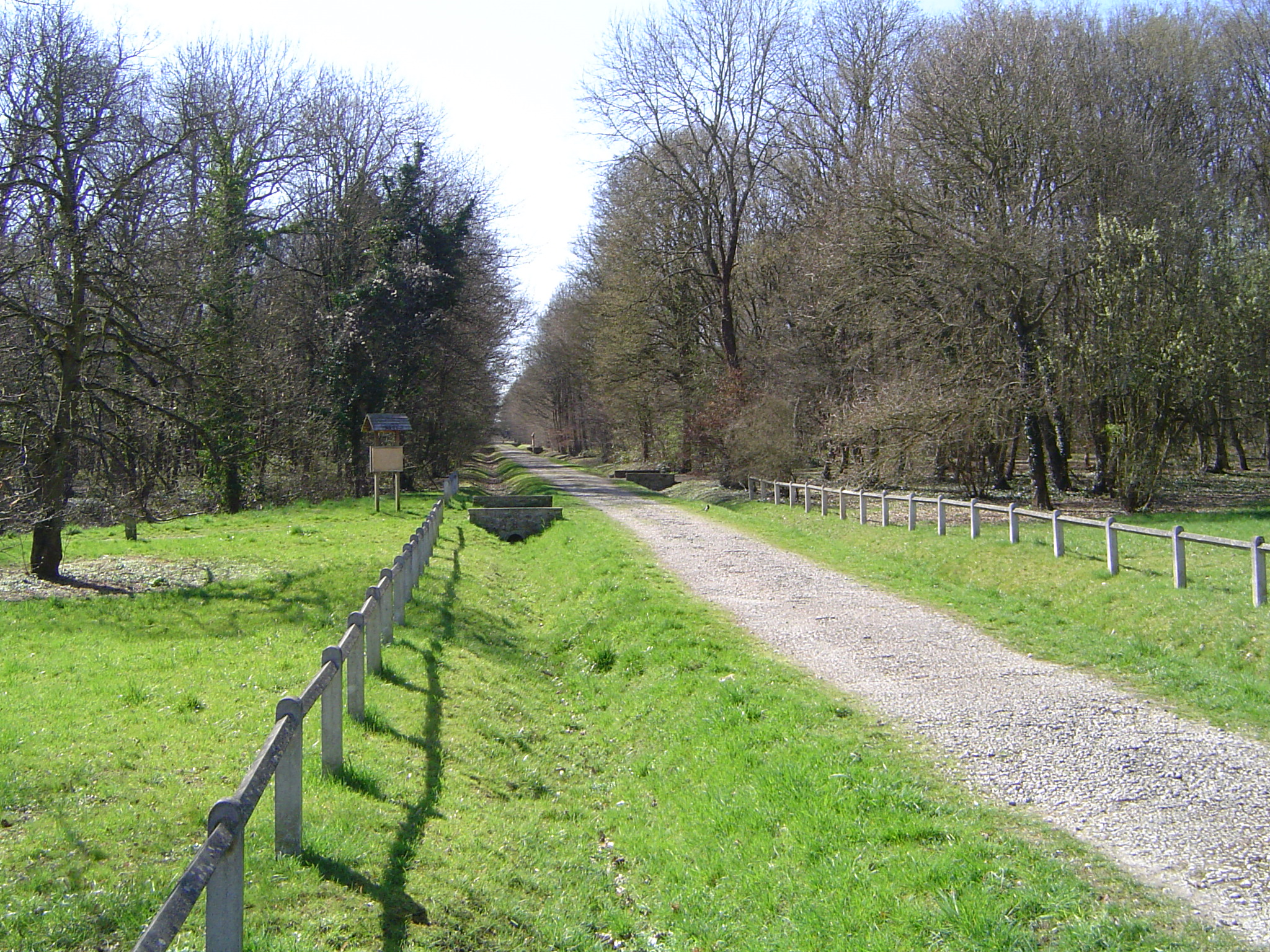 Photos prises à Lognes, commune française de Seine-et-Marne